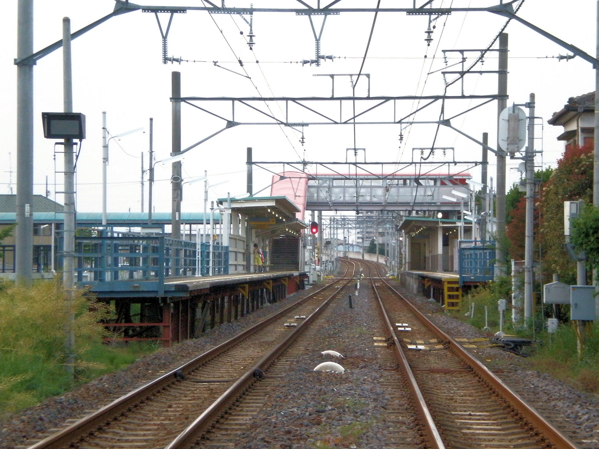 愛知県春日井市にある間内駅